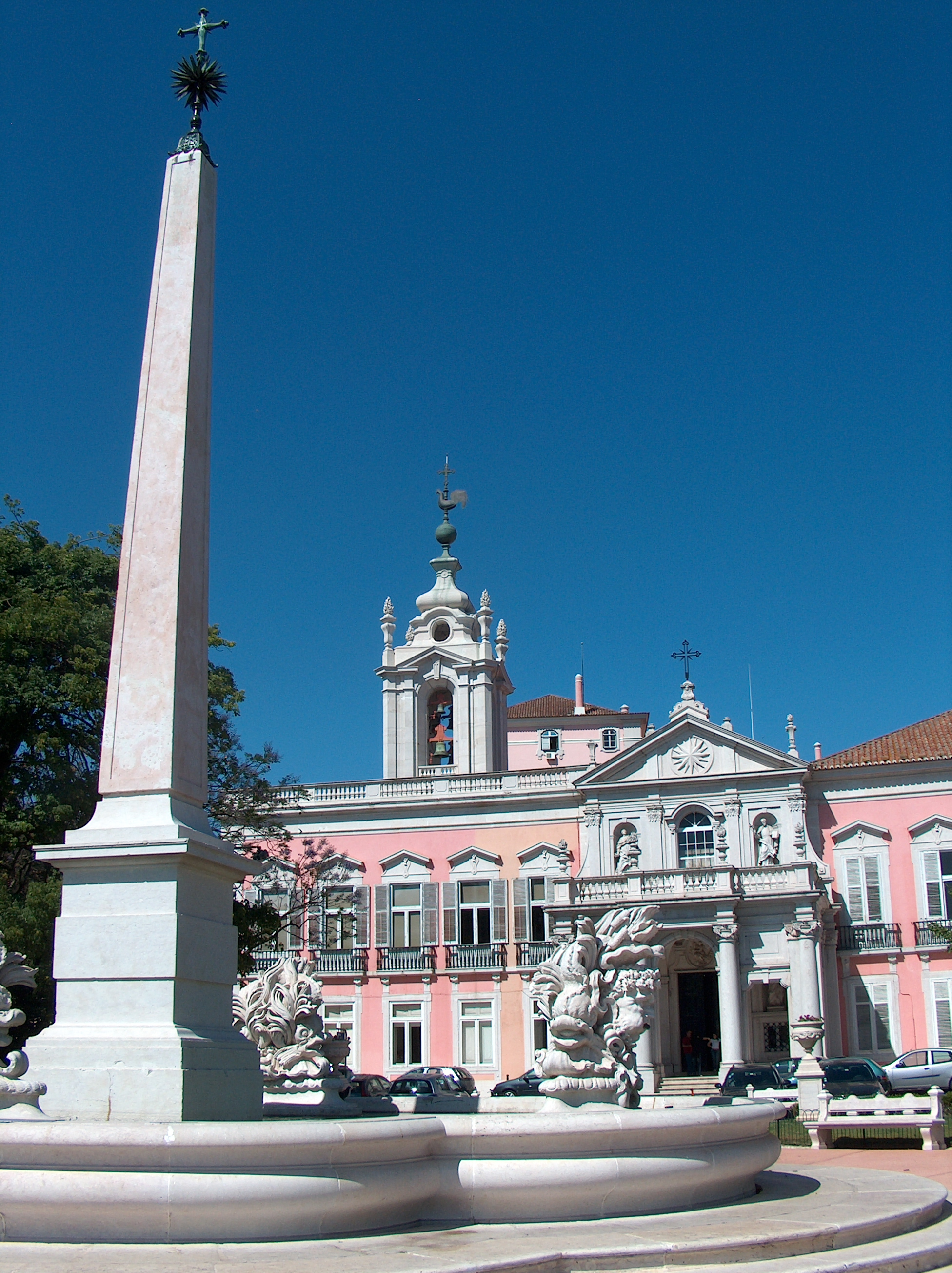 Palácio das Necessidades. Palácio oitocentista, Lisboa, Portugal.